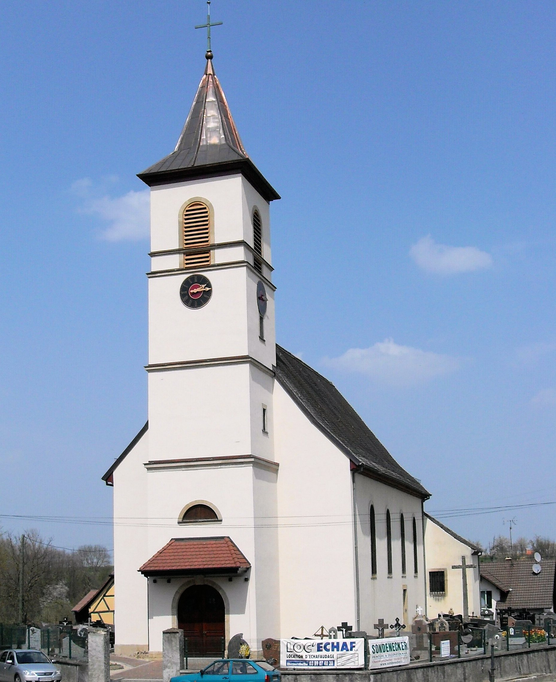 L'èglise Notre-Dame de l'Assomption à Willer